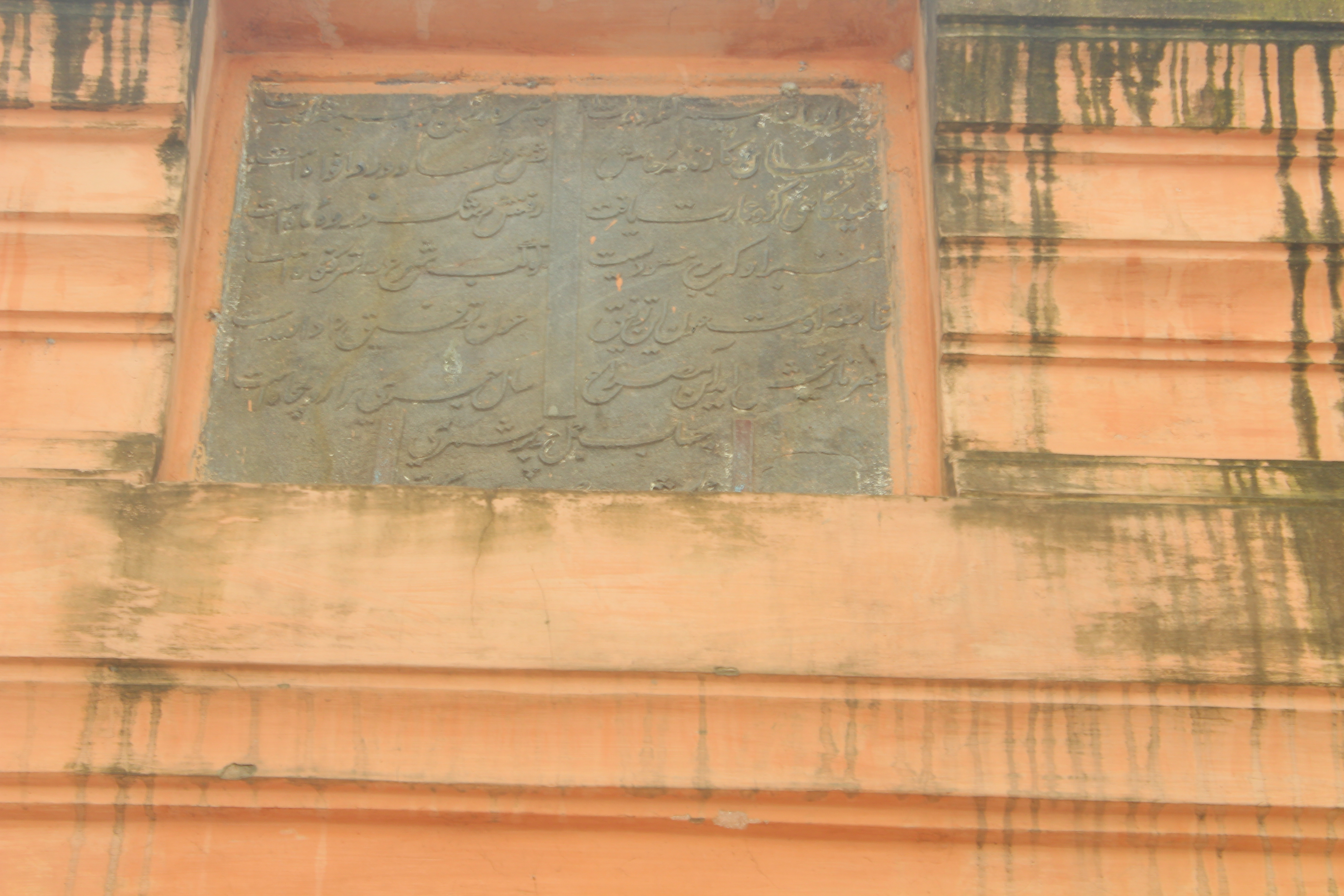 ধানমন্ডি শাহী ঈদগাহ